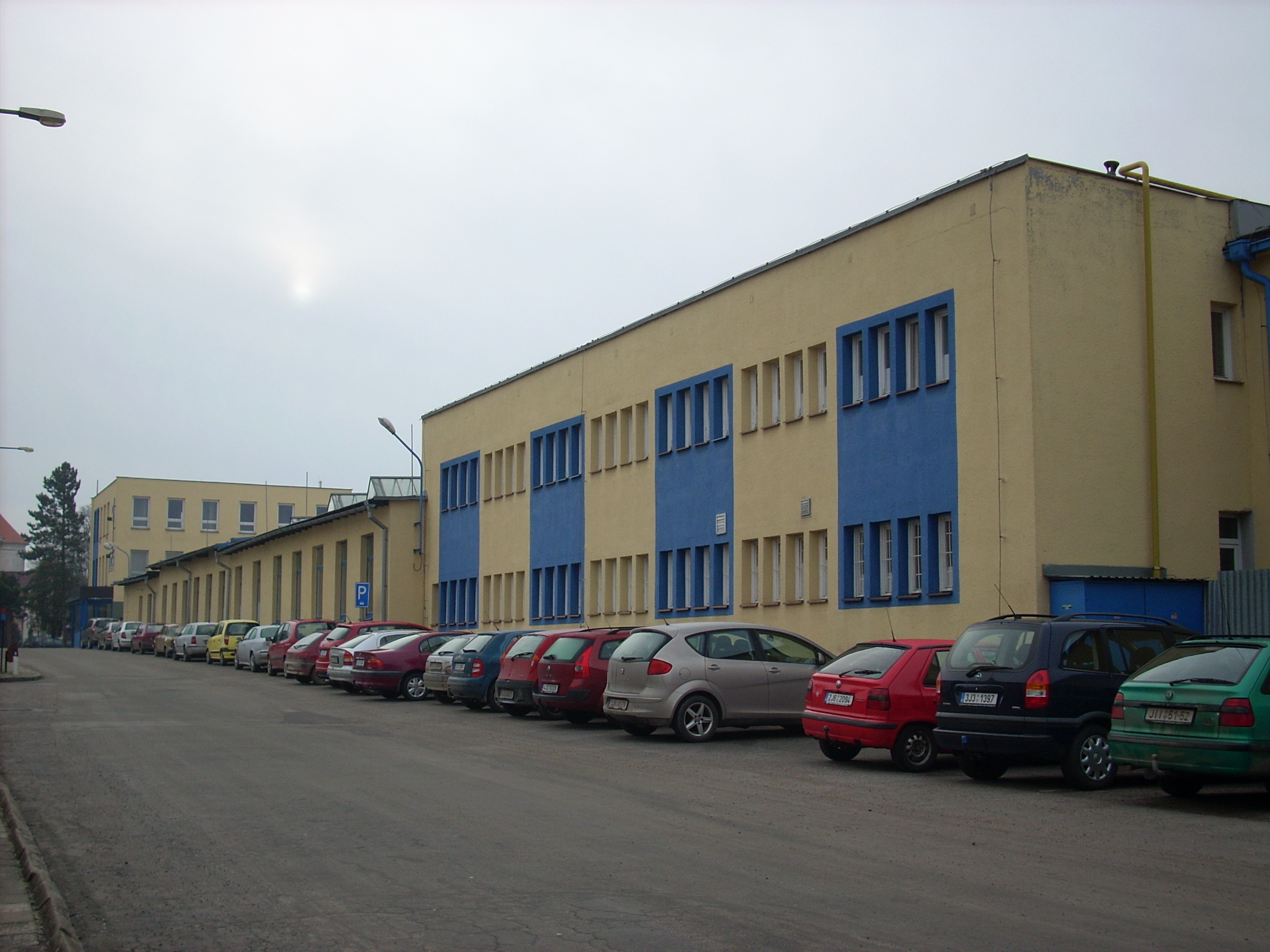 TKZ Polná